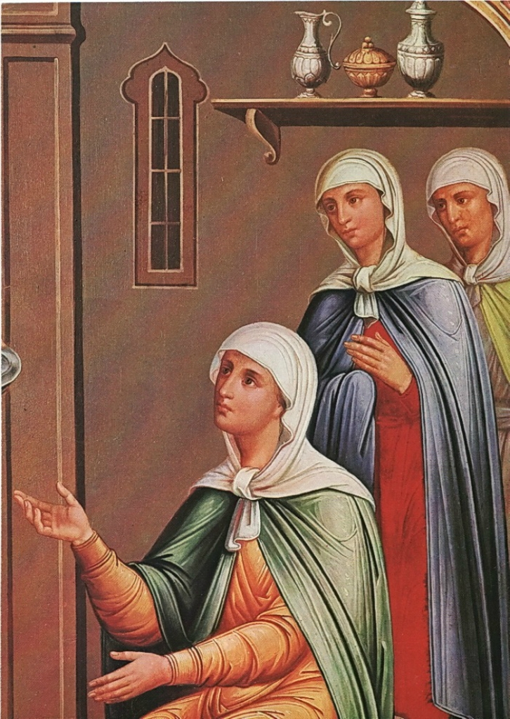 Притча о праведном и неправедном судье. Роспись западной стены Грановитой палаты. 1882